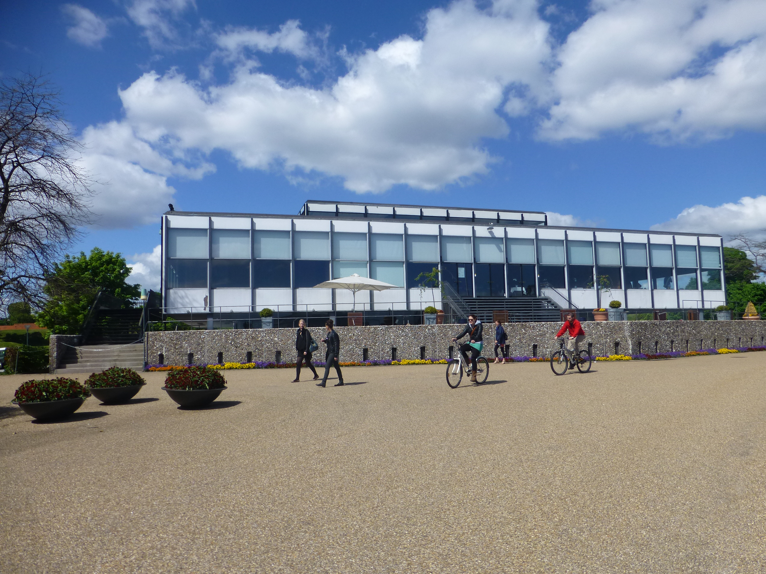 The restaurant Langeliniepavillonen in Østerbro in Copenhagen.